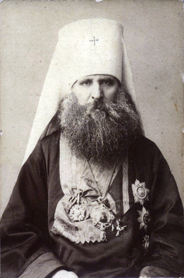 Митрополит Киевский Иоанникий (Руднев).